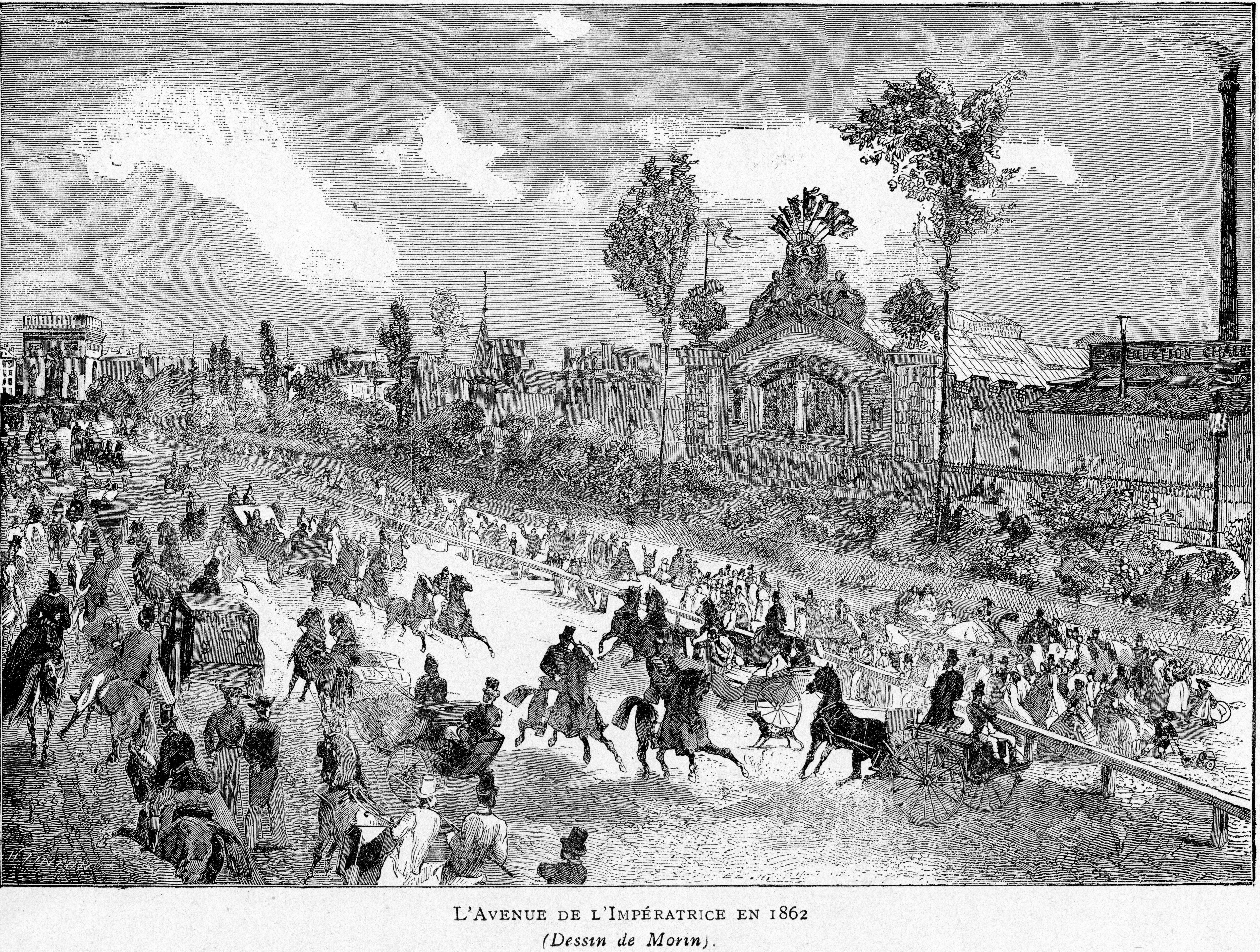 Corbel022 L'Avenue de l'Impératrice en 1862 (Dessin de Morin).